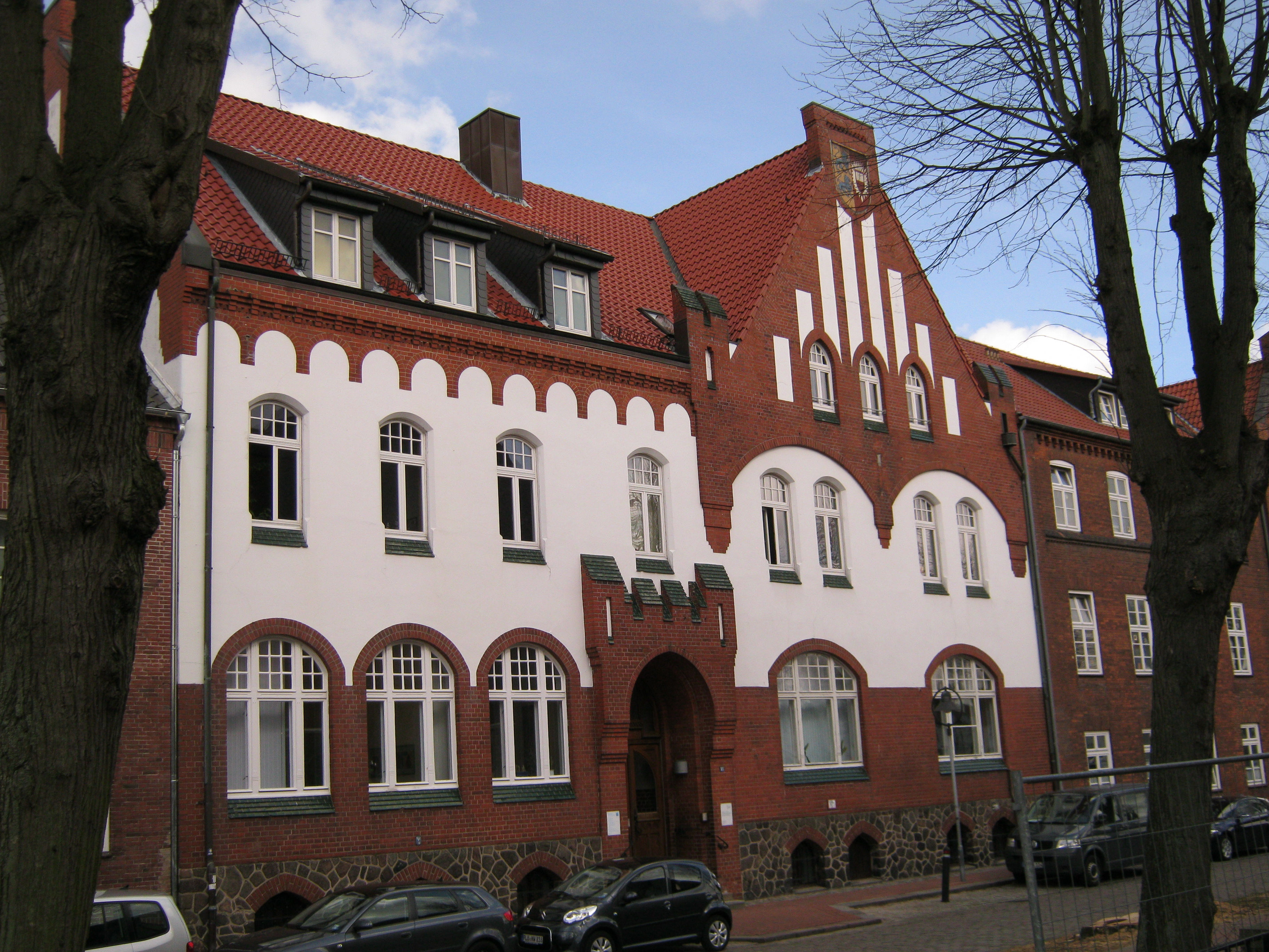 Früheres Verwaltungsgebäude des Kreises Redsburg (bis 1952), Rendsburg, Prinzenstraße 13